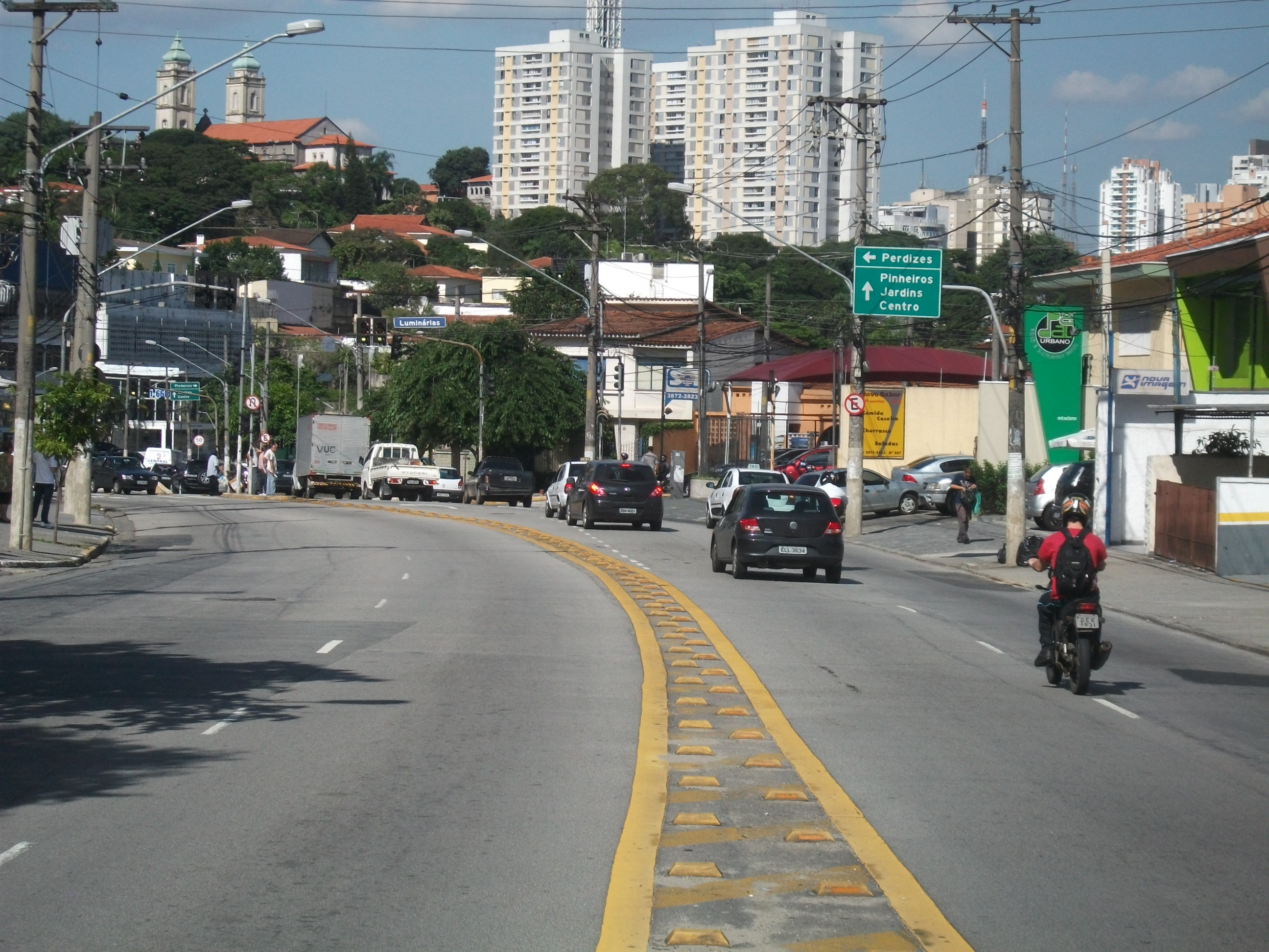 Bairro do Sumaré visto da Avenida Heitor Penteado em São Paulo - SP.